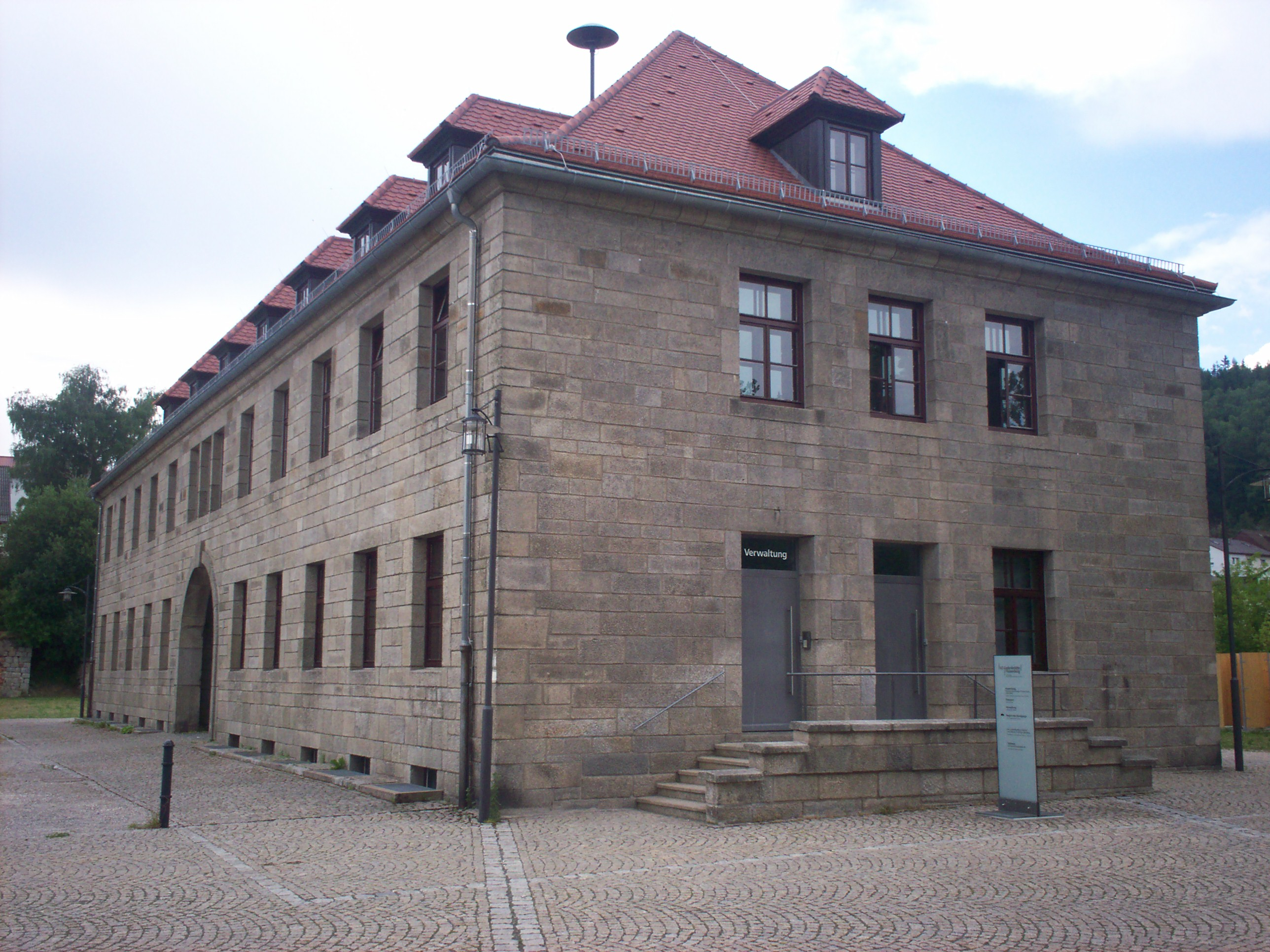 Ehemalige Kommandantur im Jahr 2008